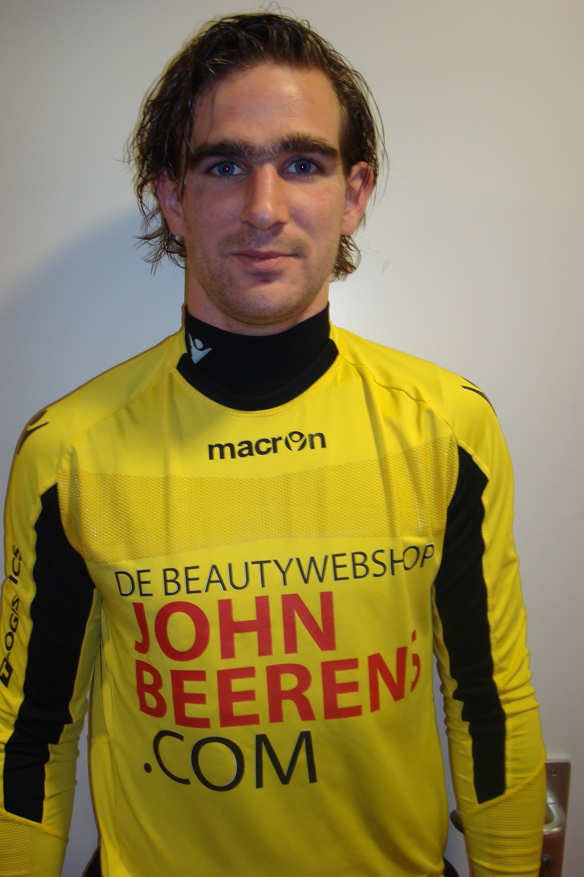 Ruud Swinkels in het shirt van Willem II seizoen 2013/2014